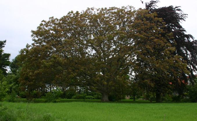 Juglans regia: Habit.